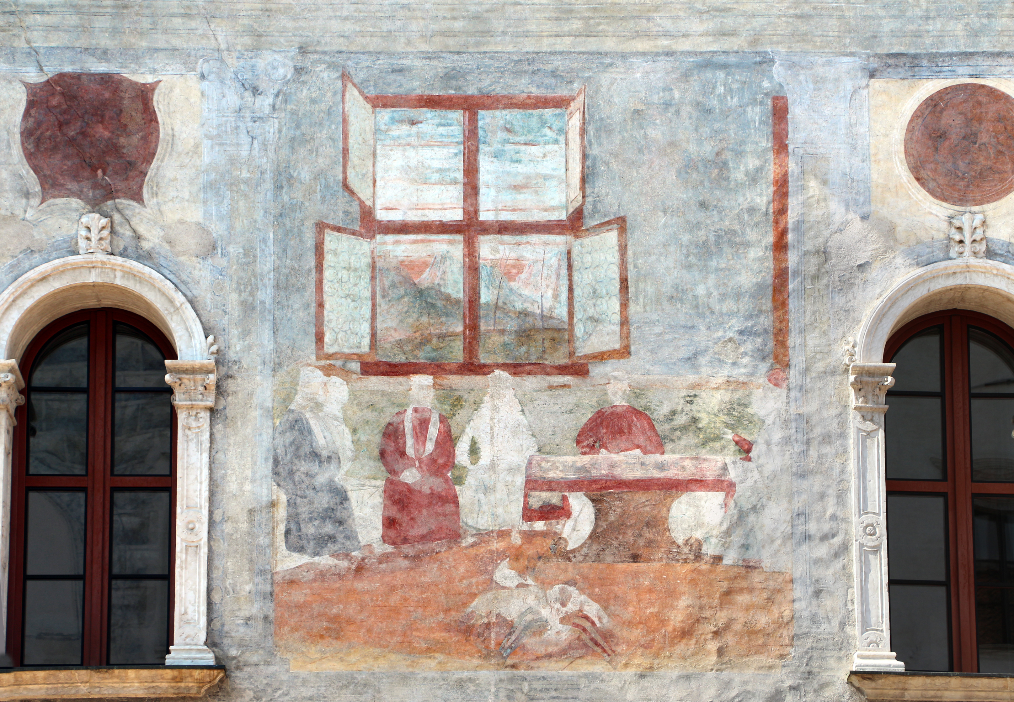 Palazzo Geremia This is a photo of a monument which is part of cultural heritage of Italy.